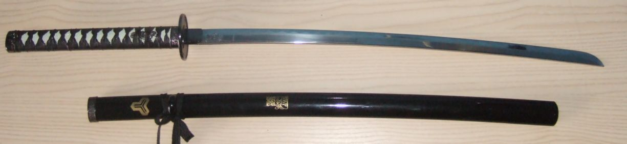 Un Katana moderne et son fourreau.